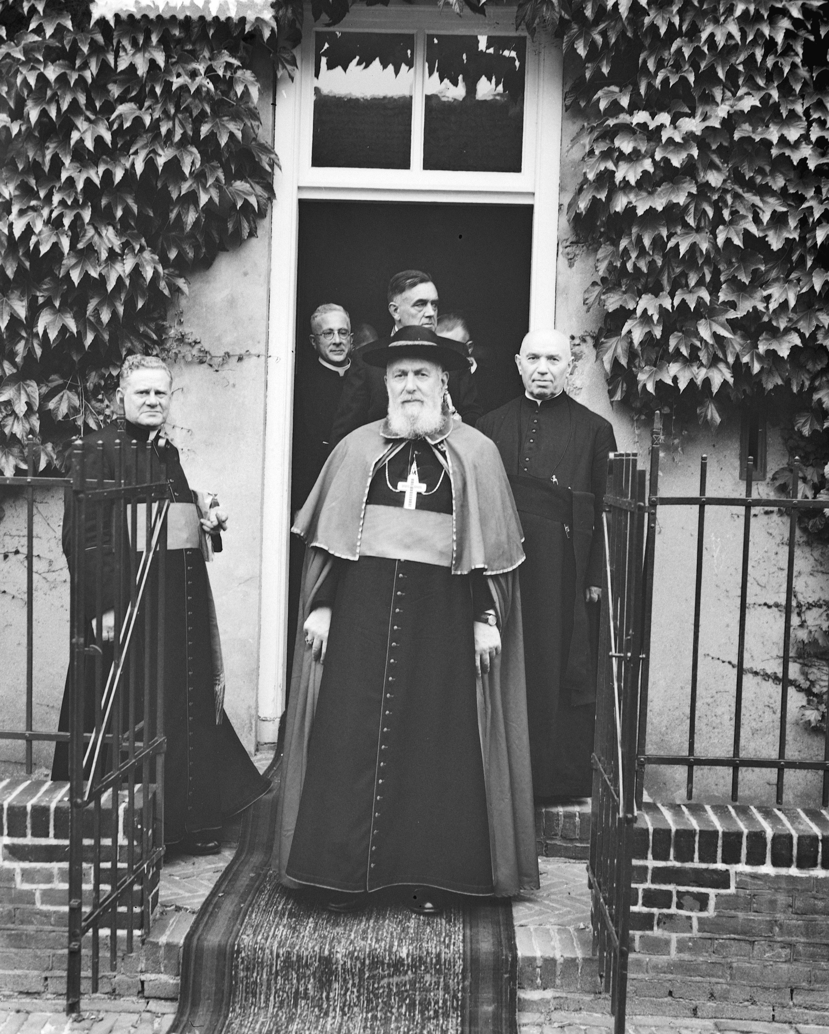 Collectie / Archief : Fotocollectie Anefo Reportage / Serie : [ onbekend ] Beschrijving : Bezoek door de Franse kardinaal Tisserant aan Grave Datum : 4 juli 1952 Locatie : Grave Trefwoorden : bezoeken, geestelijken, kardinalen Persoonsnaam : Tisserant E Fotograaf : Consenheim, Wim / Anefo Auteursrechthebbende : Nationaal Archief Materiaalsoort : Negatief (zwart/wit) Nummer archiefinventaris : bekijk toegang 2.24.01.04 Bestanddeelnummer : 905-2013